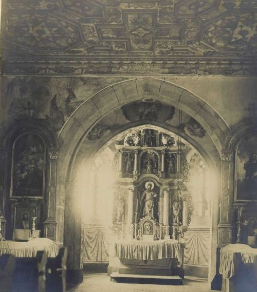 Notranjost cerkve sv. Andreja v Gostečah